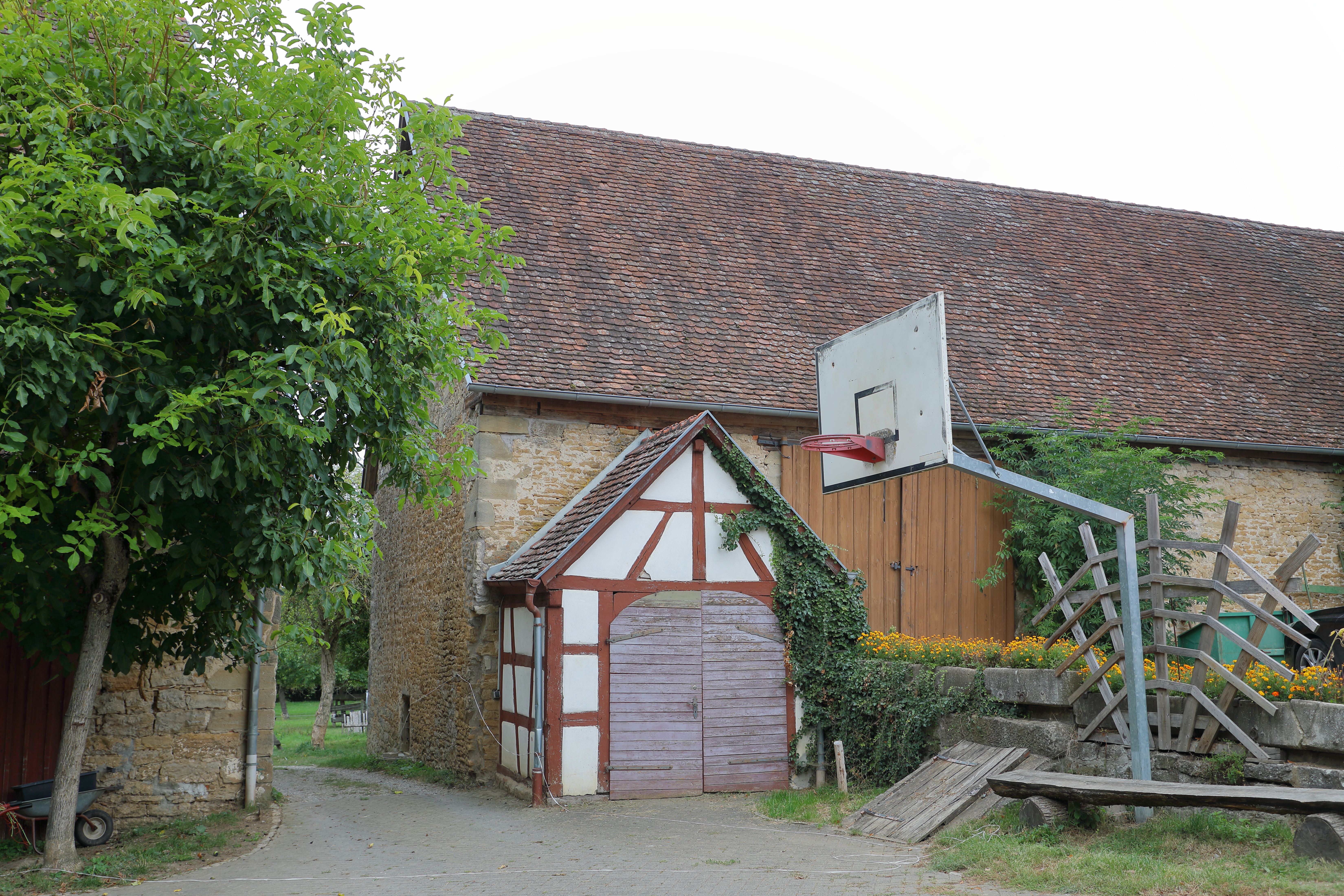 Der "Schulbauernhof Pfitzingen" ist eine Bildungseinrichtung des Landes Baden-Württemberg. Er ist u.a. in den denkmalgeschützten Gebäuden Pfitzingen 14 und Pfitzingen 41, dem "Schlösschen Pfitzingen" untergebracht.